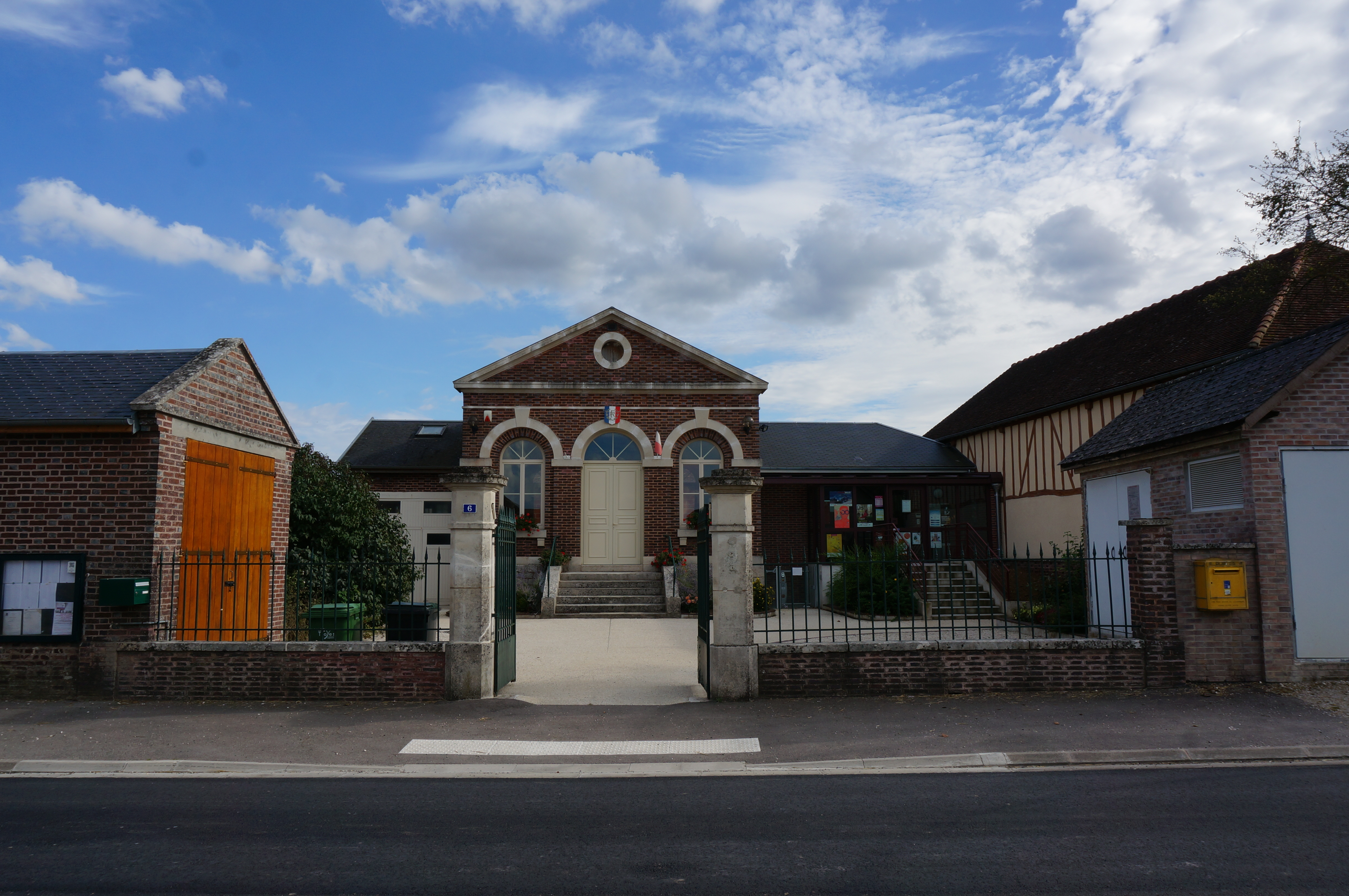 de Moussey (Aube).